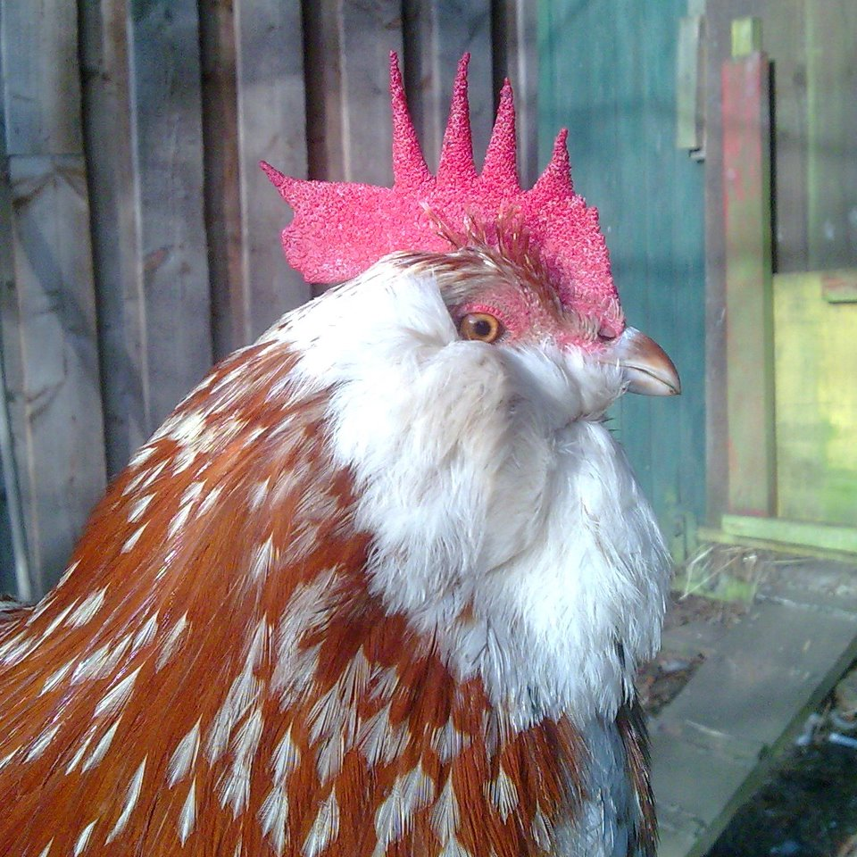 Ein Hahn (gallus gallus domesticus) (Nahaufnahme)